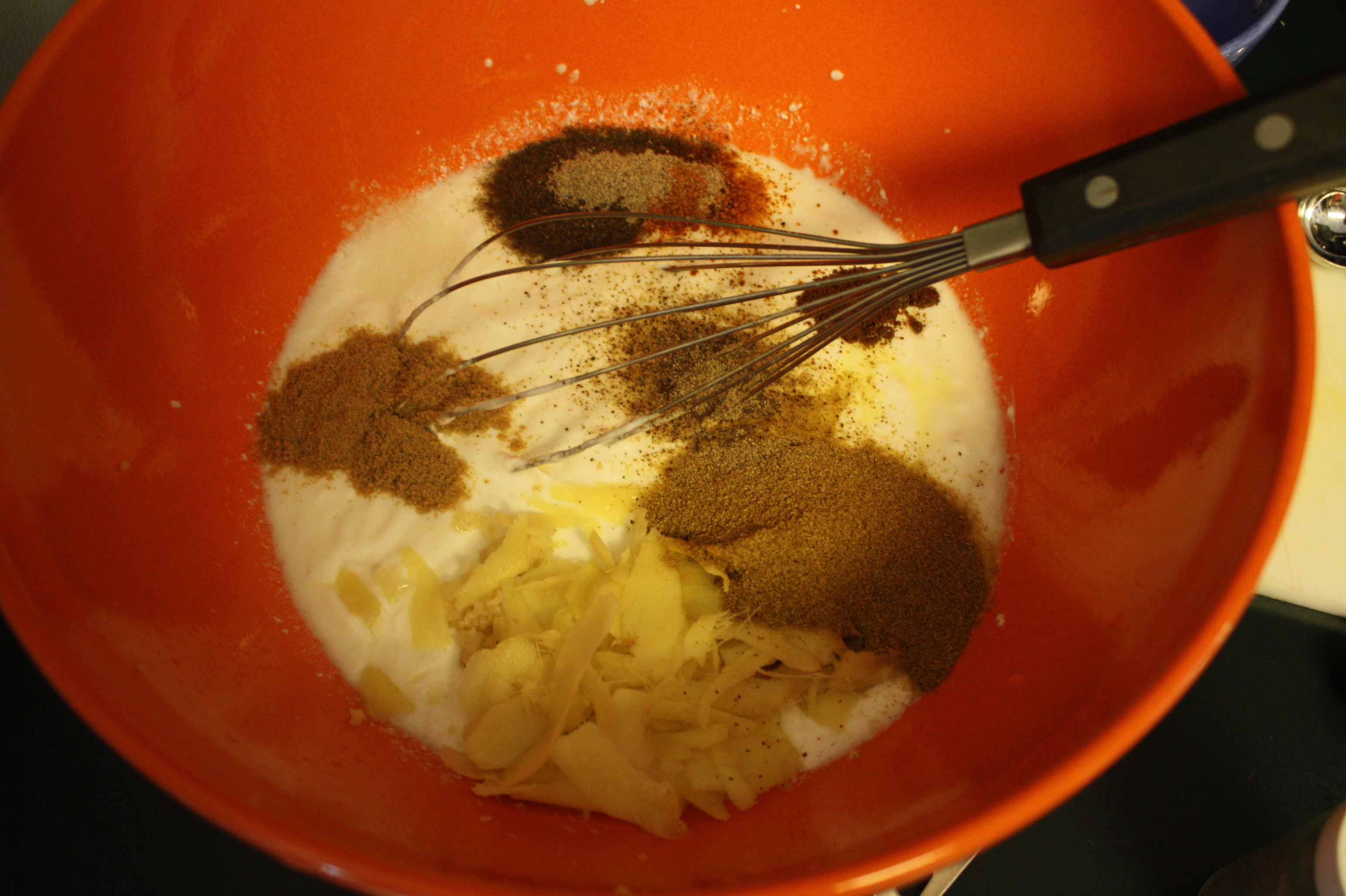 Making tandoori masala last weekend